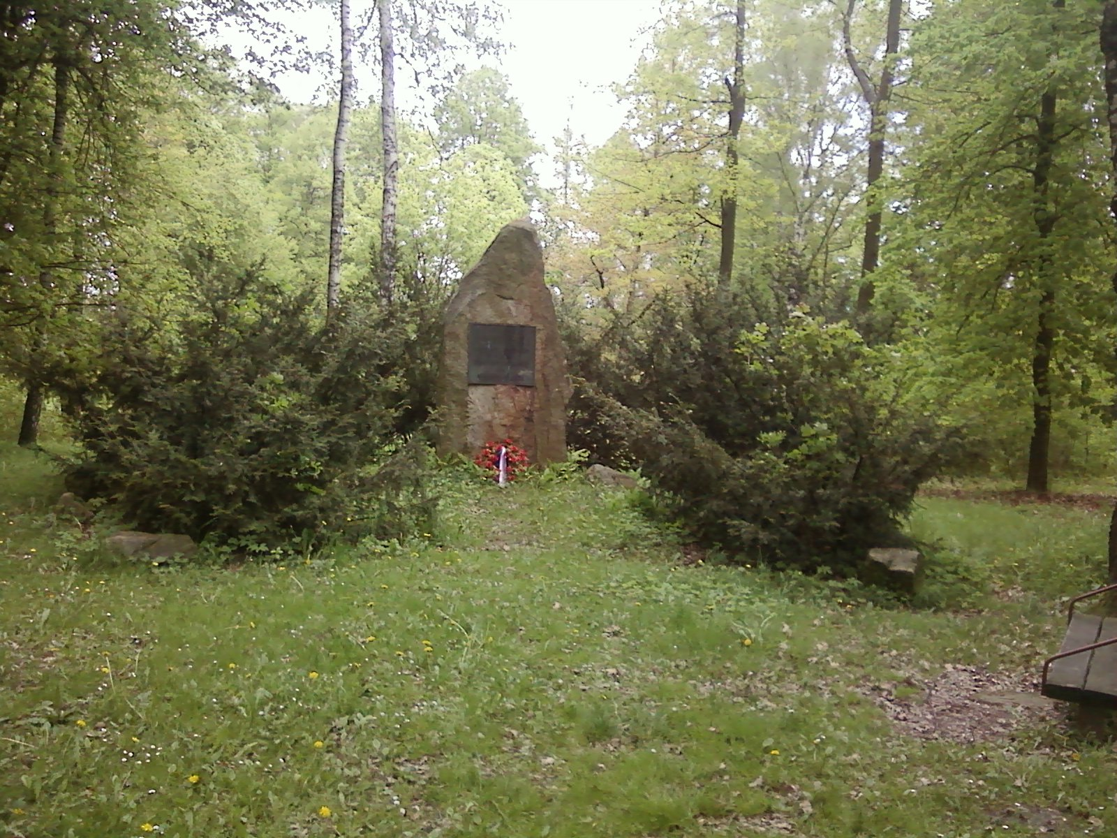 hrob Antonína Sovy v Sovově parku v Pacově